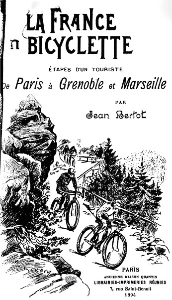 La France en bicyclette : étapes d'un touriste : de Paris à Grenoble et à Marseille... / Jean Bertot, 1894, couverture.